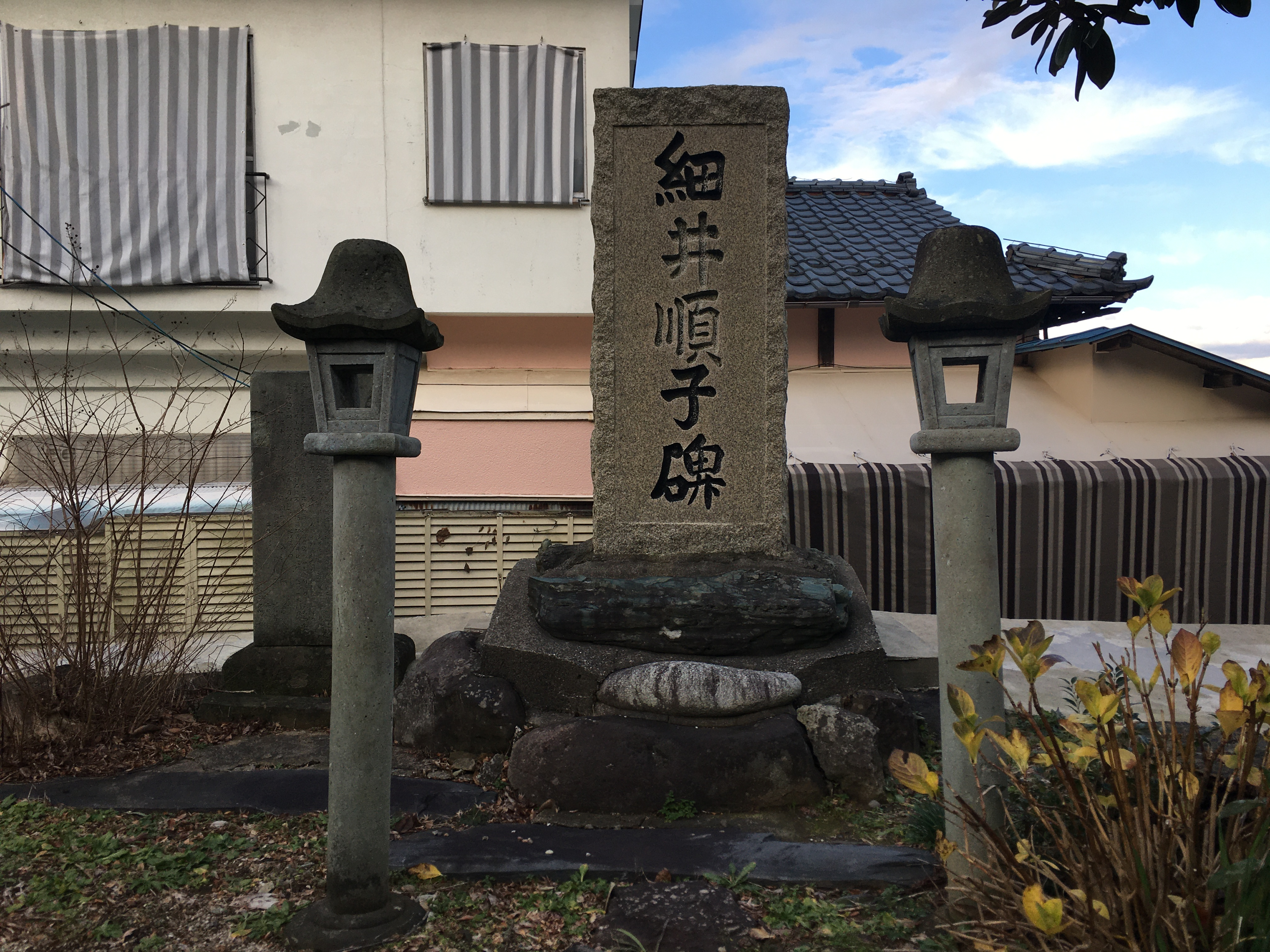 足羽山愛宕坂途中の虚空蔵寺にある細井順子の碑